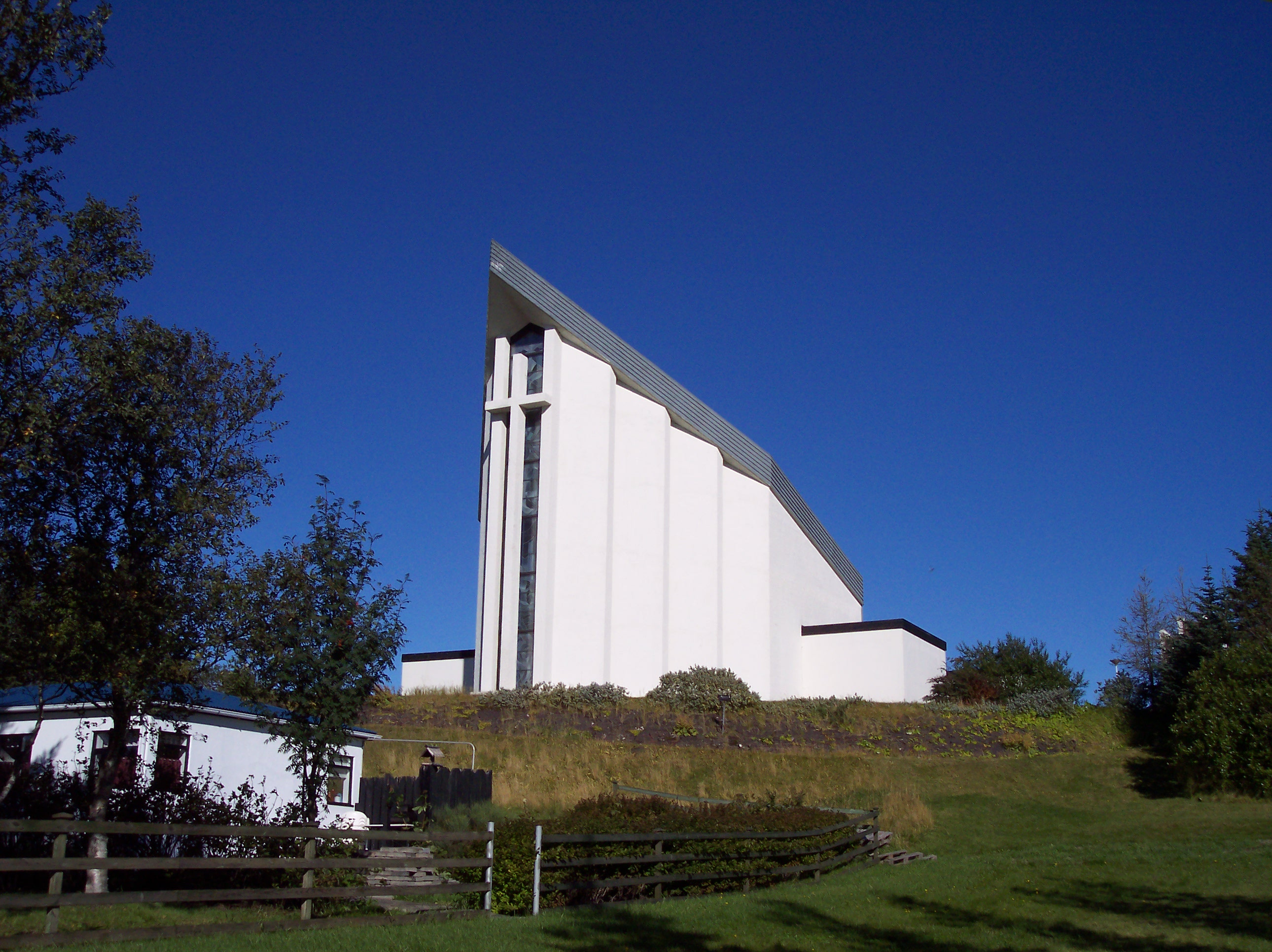 Hveragerðiskirkja, Hveragerði, Iceland